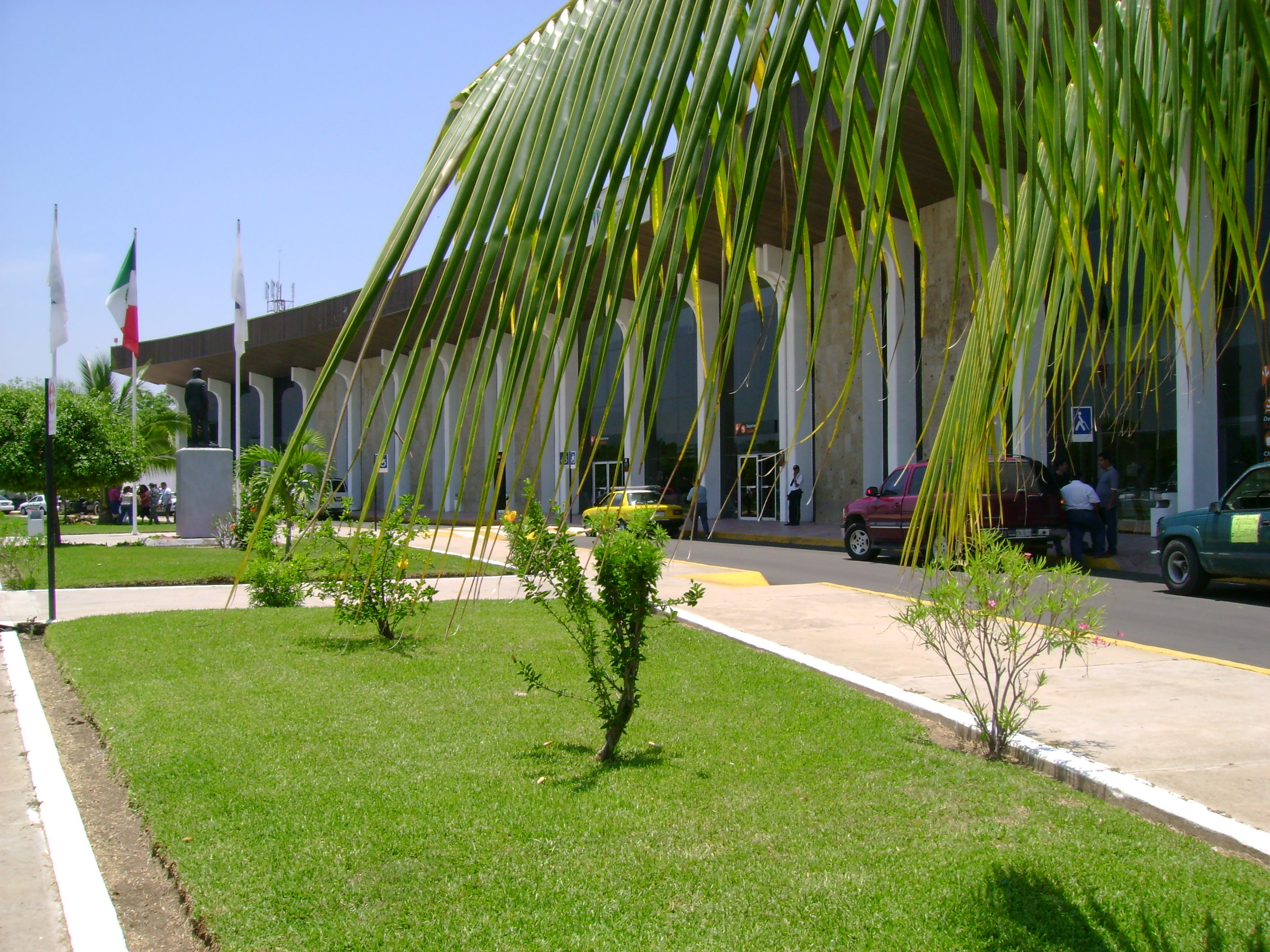 Fotografía del Aeropuerto Internacional Playa de Oro.